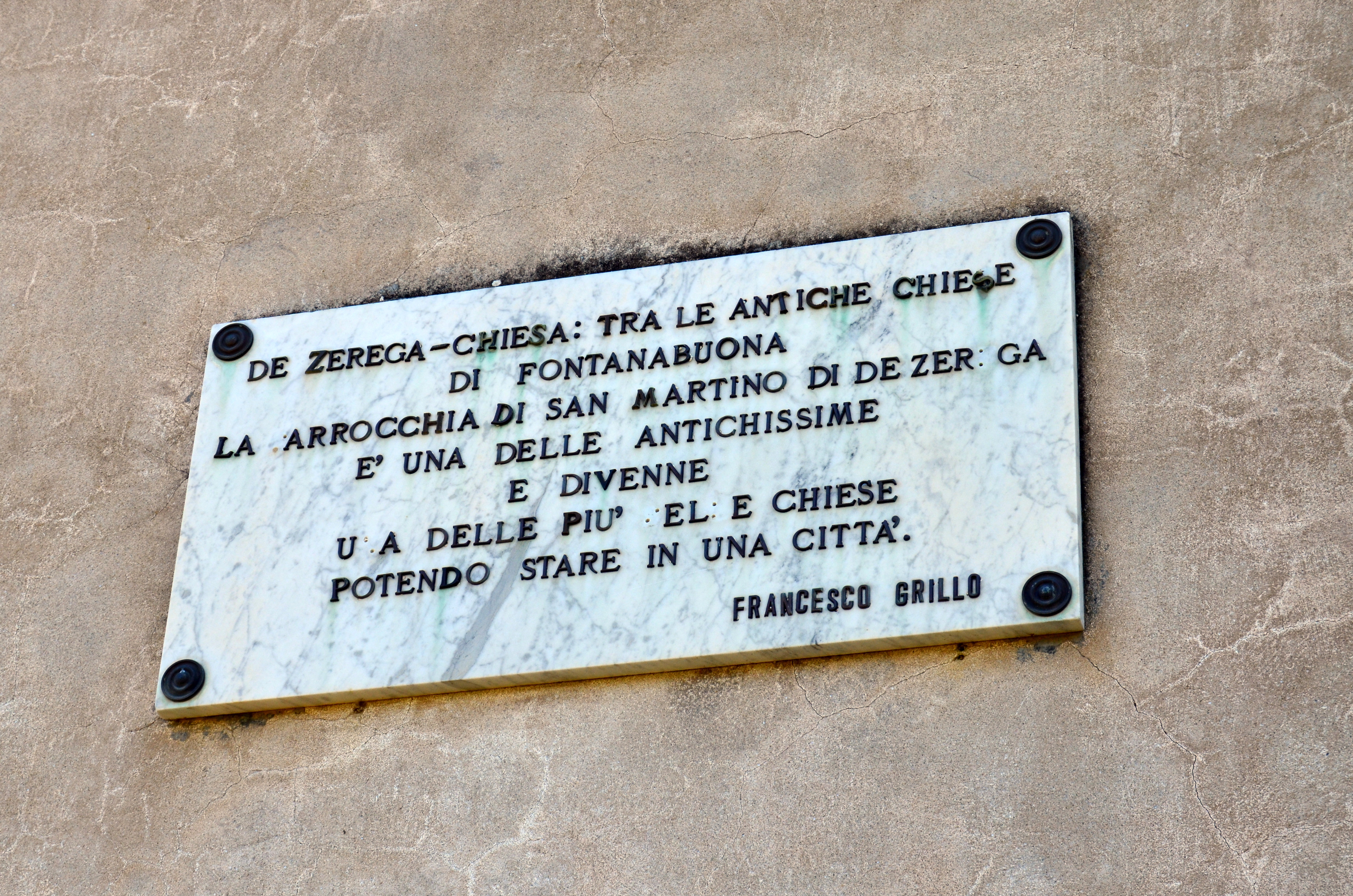 La chiesa di San Martino, Dezerega, Coreglia Ligure, Liguria, Italy